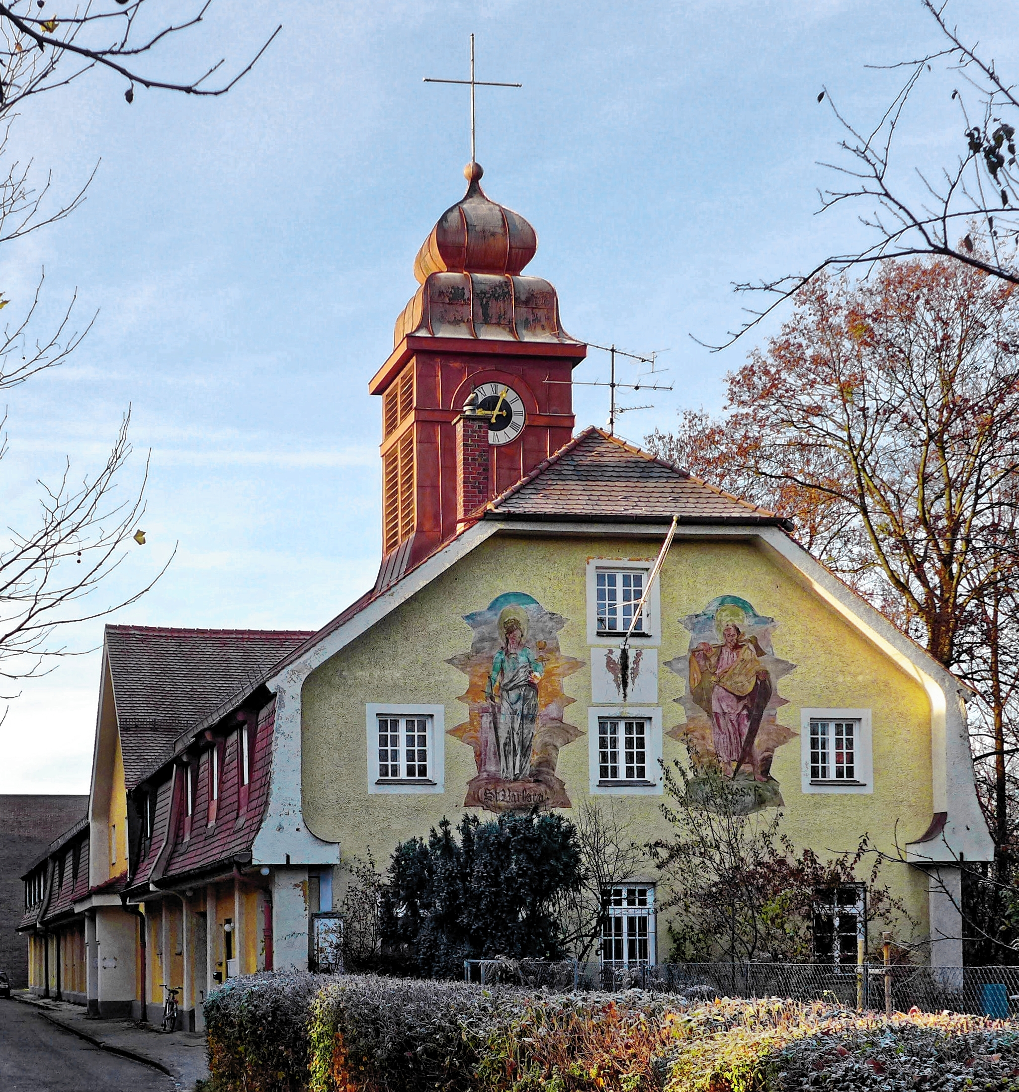 Kirche St. Barbara, Infanteriestr. 15, München